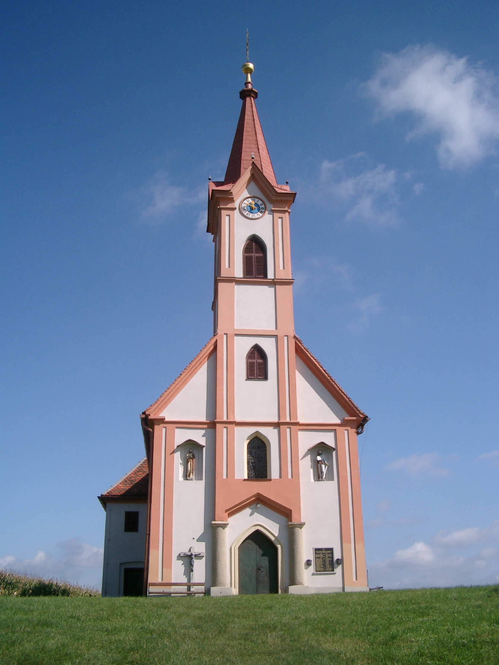 Messkapelle Hl. Dreifaltigkeitin Glojach, Steiermark.